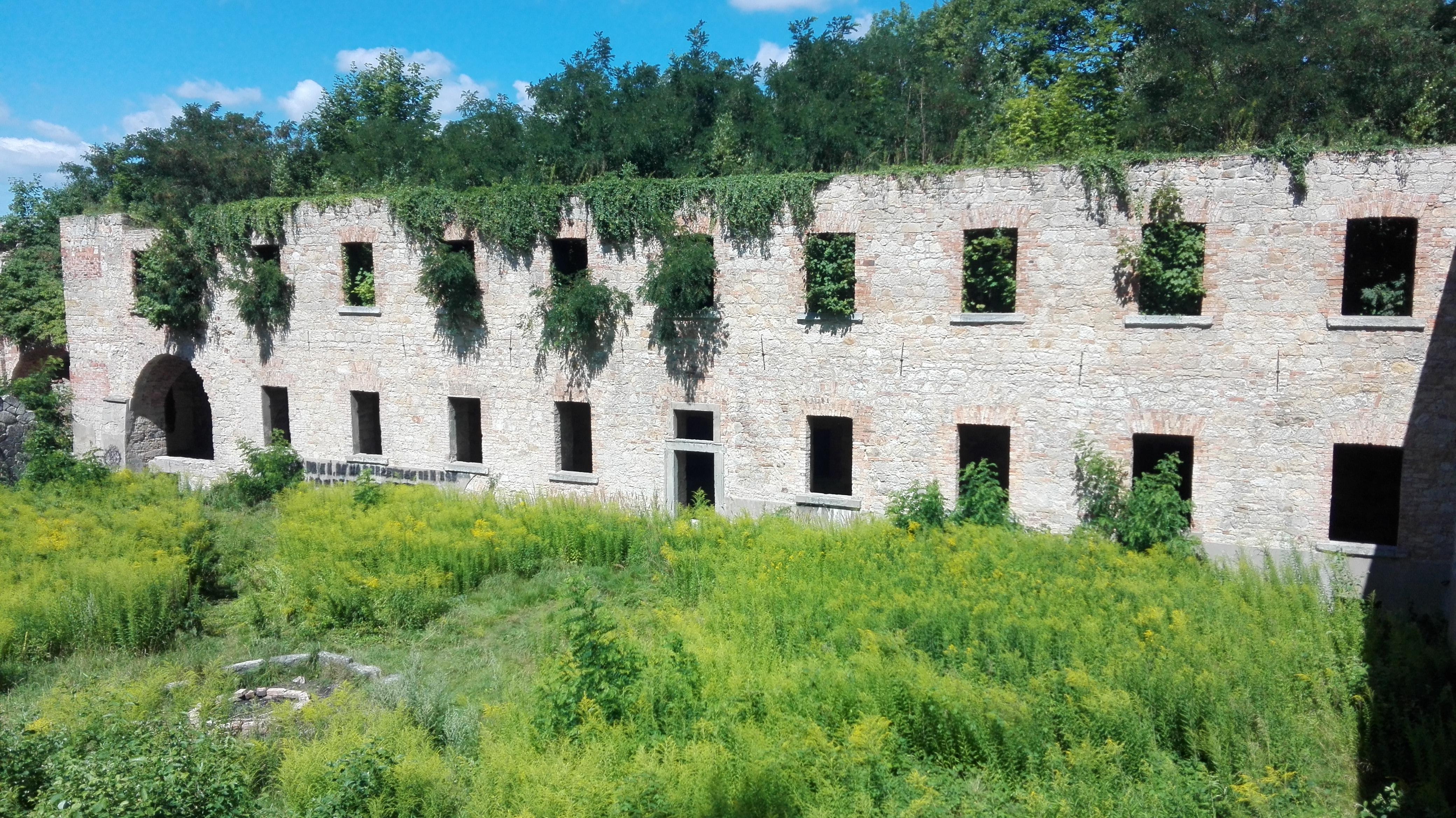 Widok na dawny dziedziniec klasztorny.